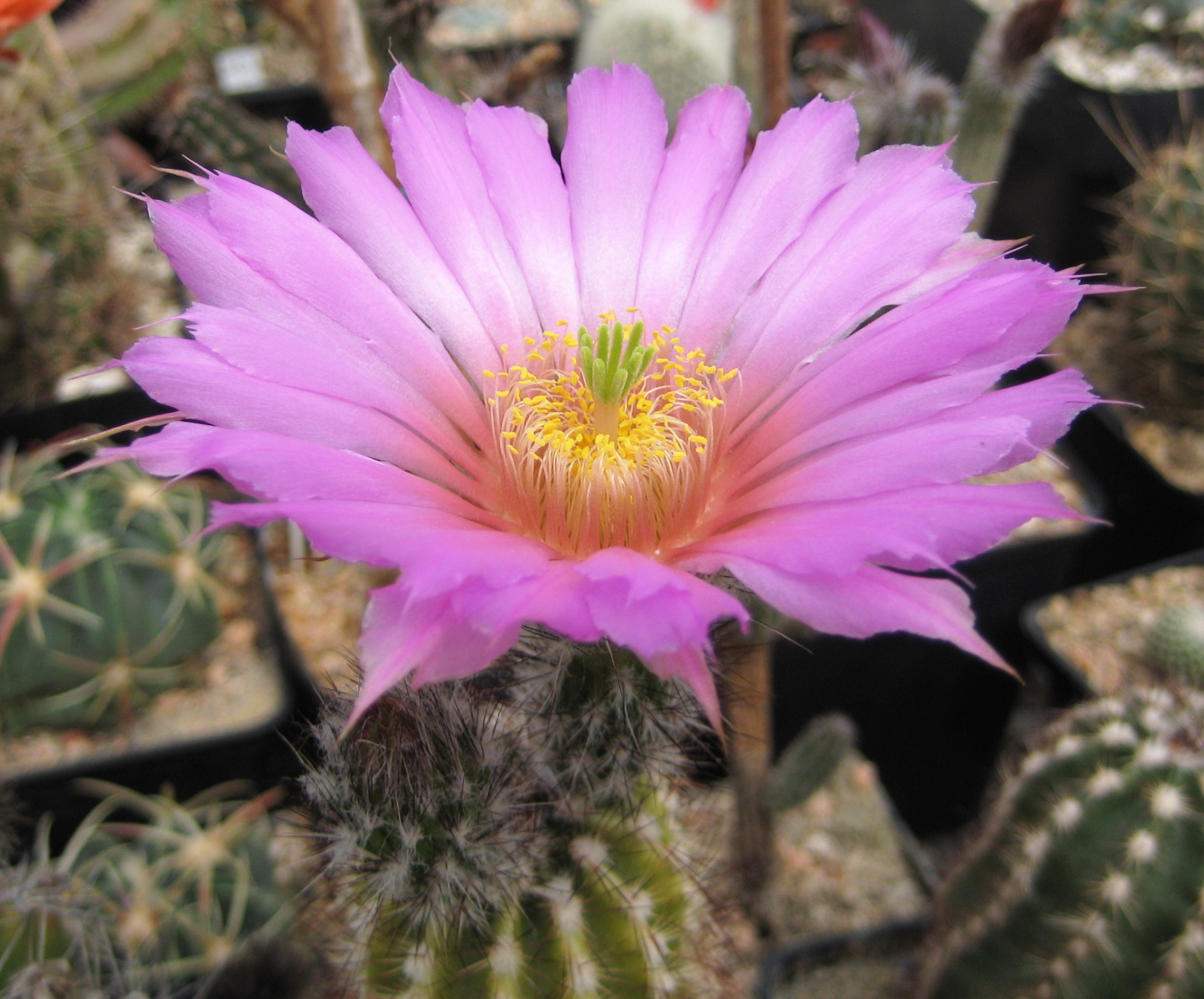 Echinocereus palmeri in Kultur